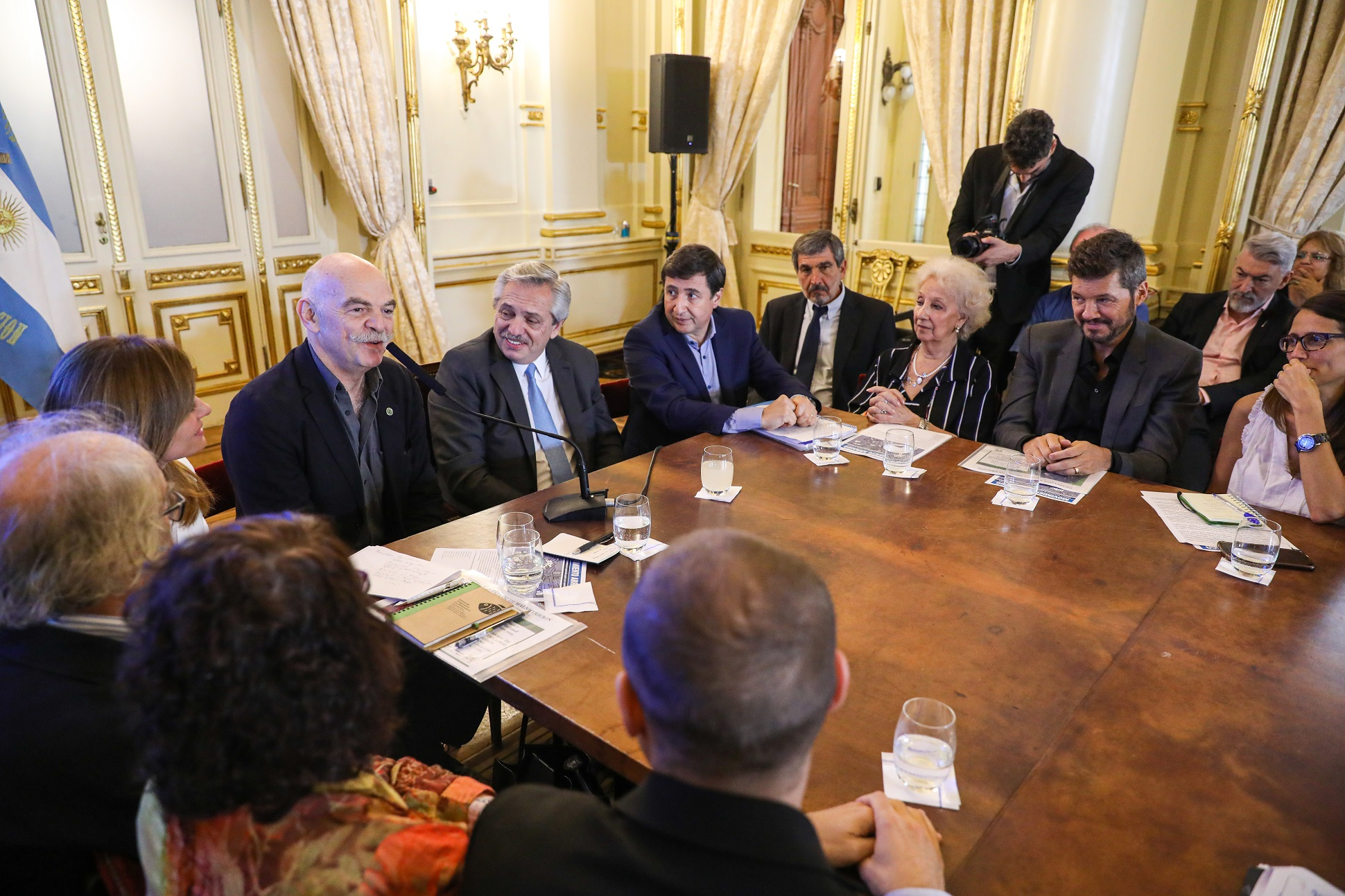 El presidente Alberto Fernández encabezó en Casa Rosada la primera reunión del Consejo Federal Argentina contra el Hambre. El mandatario nacional insistió ante un centenar de referentes empresariales, sindicales, de organizaciones sociales, de universidades y de la sociedad civil que “este plan no es el plan del gobierno ni de Alberto Fernández, es el plan de la Argentina”. “Por una vez olvidémonos de nosotros, de quienes somos, de cómo pensamos y que representamos. Y admitamos lo indigno que es ser parte de una sociedad que no se preocupa por la gente que pasa hambre”, remarcó el Presidente. Del encuentro participaron los ministros Daniel Arroyo (Desarrollo Social), Luis Basterra (Agricultura, Ganadería y Pesca), Martin Guzmán (Economía), Ginés González García (Salud), María Eugenia Bielsa (Desarrollo Territorial y Hábitat), Gabriel Katopodis (Obras Públicas), Elizabeth Gómez Alcorta (Mujer, Género y Diversidad), Roberto Salvarezza (Ciencia y Tecnología) y Nicolás Trotta (Educación), como así también Victoria Tolosa Paz (Consejo Federal de Políticas Sociales), el escritor Martín Caparrós, Hilda Chiche de Duhalde, Marcelo Tinelli, Estela de Carlotto (Abuelas de Plaza de Mayo), Agustín Salvia (Observatorio de la Deuda Social Argentina de la UCA), Sonia Alesso (Ctera), monseñor Carlos Tissera (Cáritas), Carlos Vila Moret (Sociedad Rural), Bernardo Affranchino (Aciera), Roberto Baradel (CTA), Antonio Aracre (Syngenta) y el supermercadista Víctor Fera. También estuvieron Narda Lepes, Vanesa Herrera Noble, Esteban “Gringo” Castro (CTEP), Isaack Rudnik (Icepsi), Jaime Perczyk (Universidad Nacional de Hurlingham), Jorge Knoblovits (DAIA), Daniel Funes de Rioja (Copal) Adolfo Pérez Esquivel (Premio Nobel de la Paz), Carlos Achetoni (Federación Agraria), Juan Vasco Martínez (Supermercadistas) y Pablo Narvaja (Pastoral Social), entre otros.